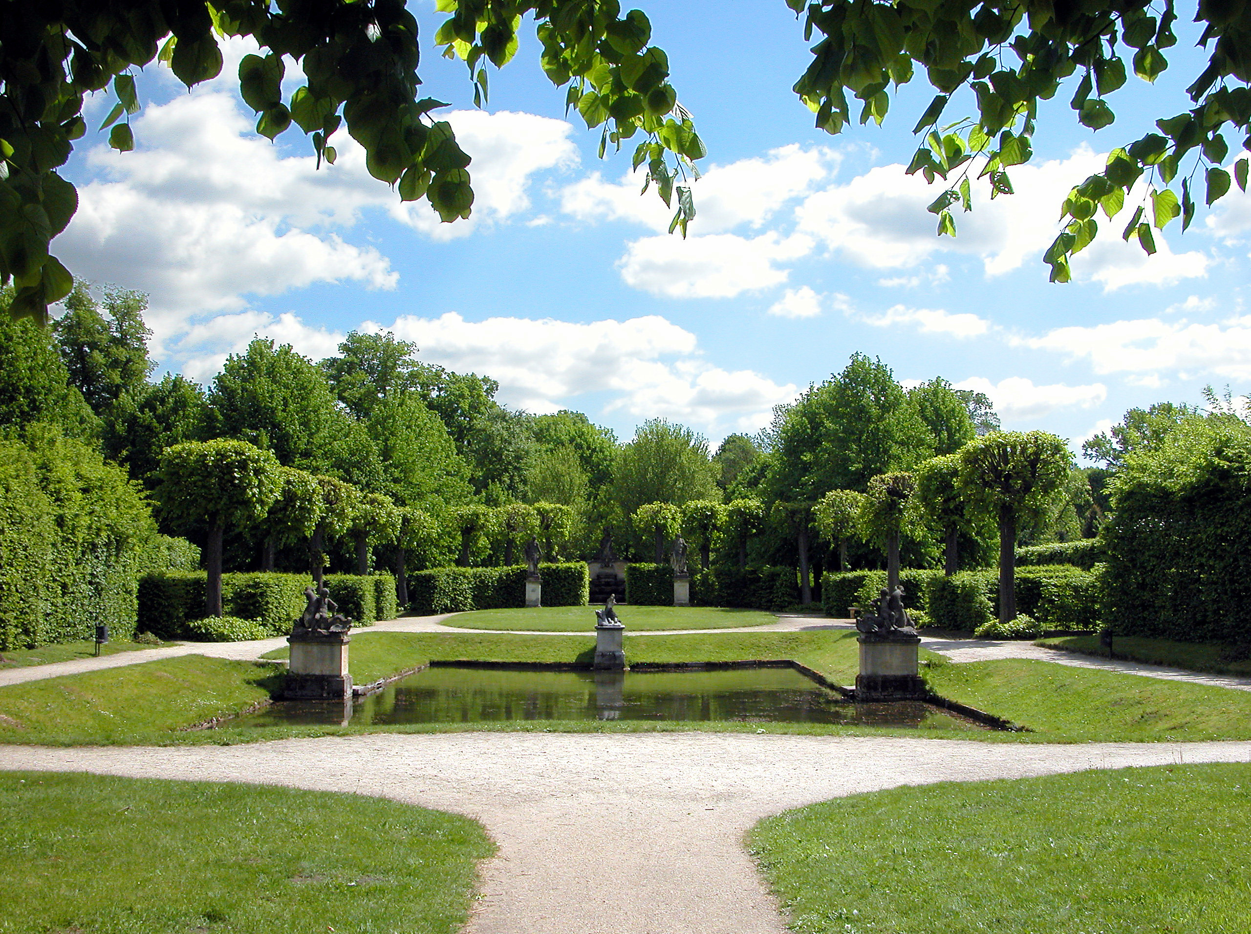 13.05.2015 03229 Altdöbern: Schloßanlage (GMP: 51.653714,14.035239), Barockpark. 1717/18 entstanden Schloß und Park, 1749/50 wurde das Schloß erheblich vergrößert. In den Jahren 1880 - 83 erhielt die Gesamtanlage ihr endgültiges Gesicht. Nach der Wende kam das Schloß in den Besitz der Brandenburgische Schlösser GmbH. 1991 erfolgte die Wiederherstellung des Wasserbeckens vor dem Schloß, 1991-1993 des Neptun-Brunnens und 1992/1993 des barocken Bassins im Französischen Garten. [DSCN5542.JPG]20150513125DR.JPG(c)Blobelt